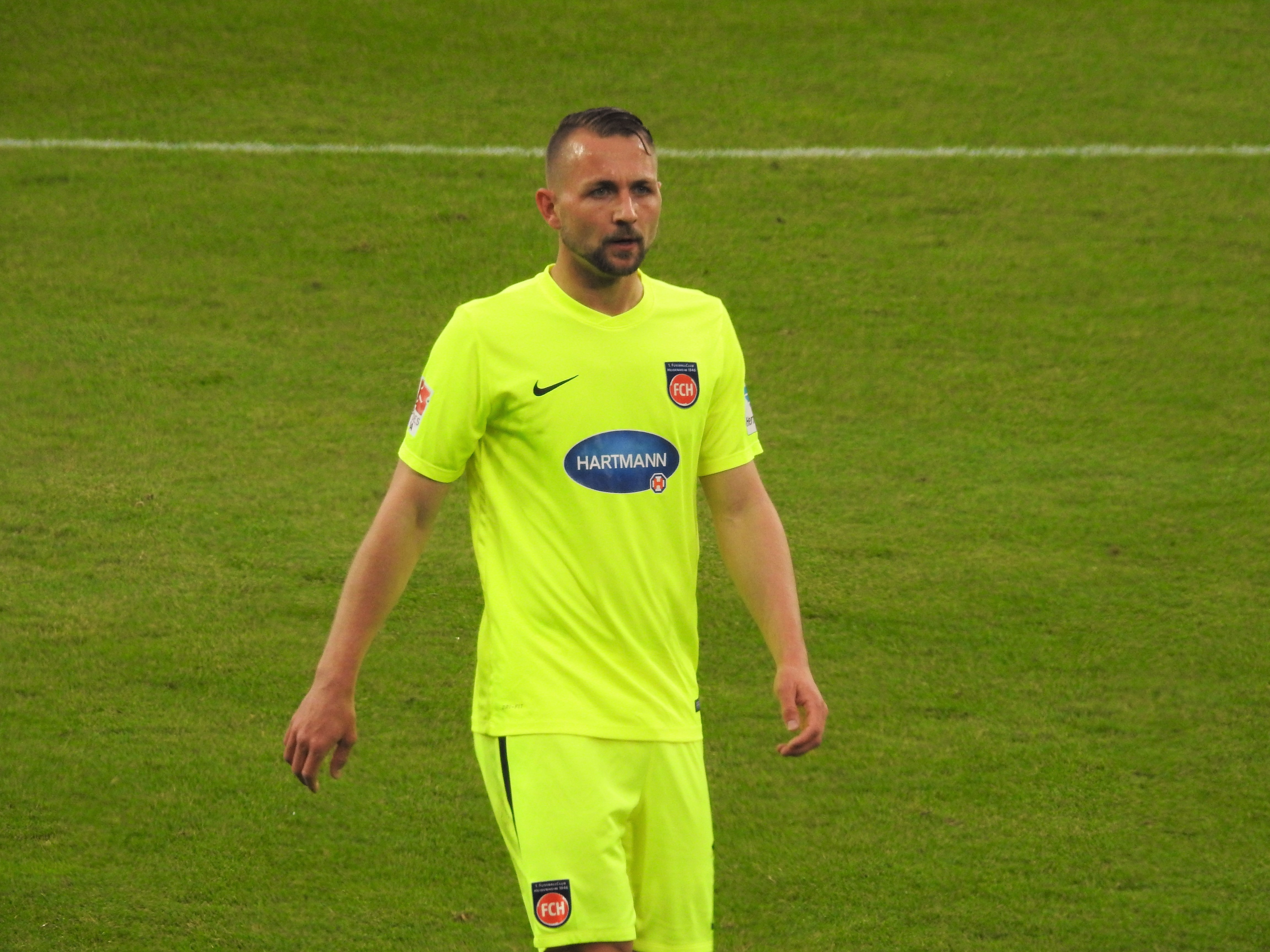 John Verhoek 2017